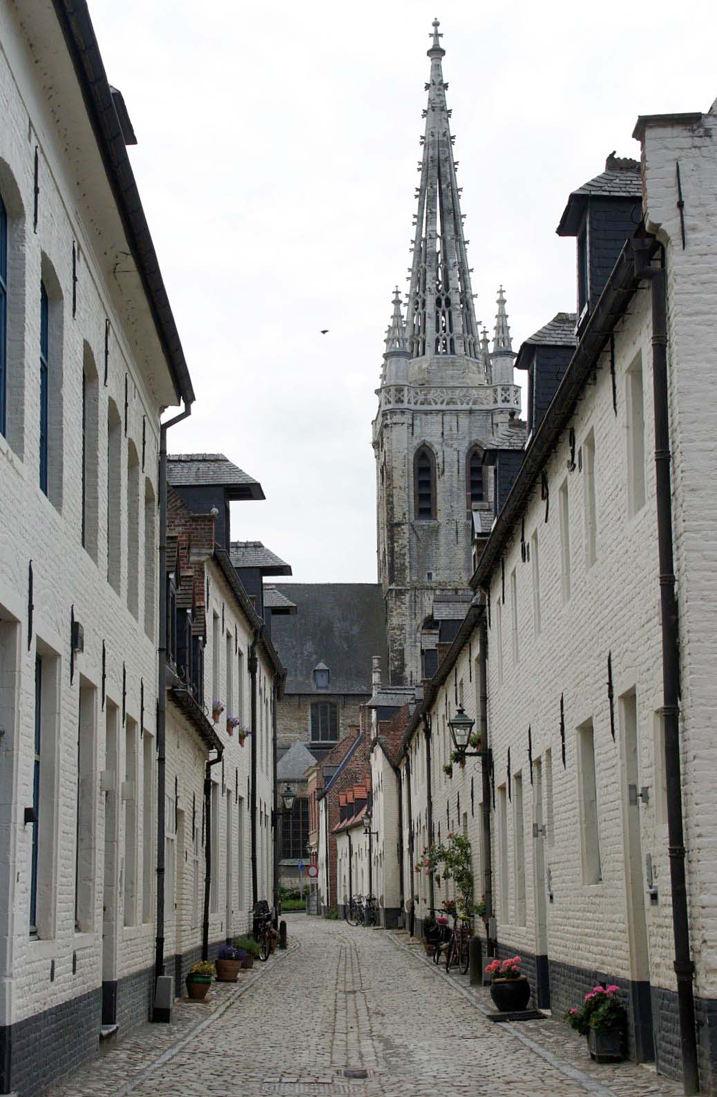 De hoofdstraat van Het Klein Begijnhof